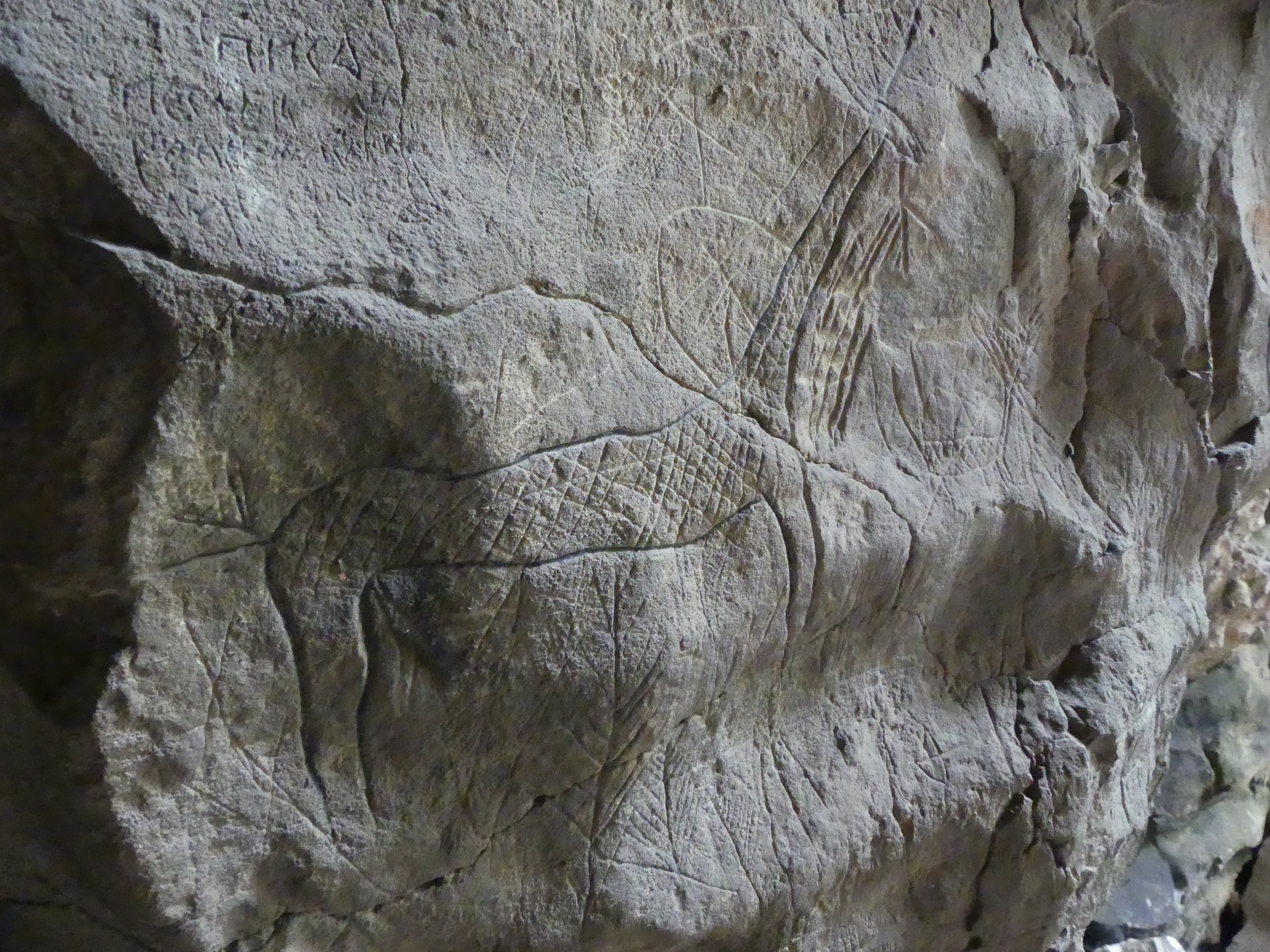 Част от комплекса Говедарника до село Царевец, Врачанско